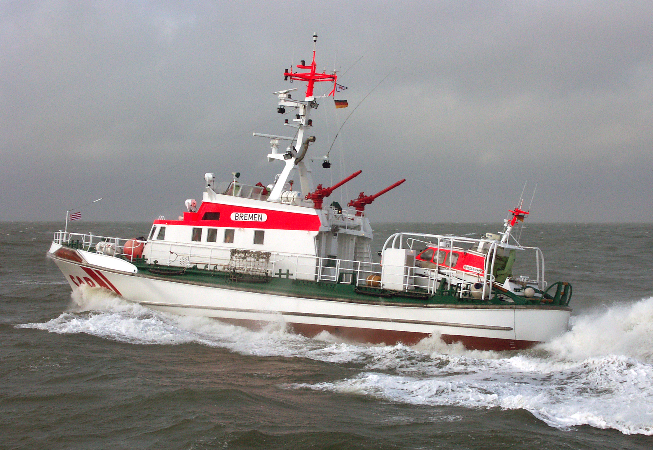 SK Bremen im November 2007 in der Nordsee